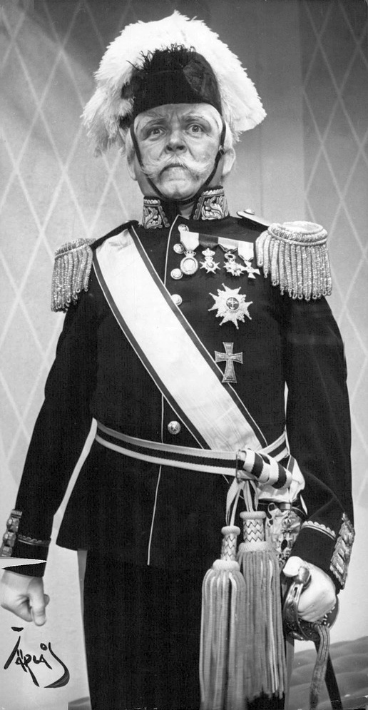 Kar de Mummas vårpremiär på Blancheteatern – Revyn hette Kar de Mummas Vaktparad denna gång – ägde rum på torsdagskvällen och blev den löftesrika upptakten till ett förvisso ihållande sommarnöje på "den ambitiösa lilla scenen vid Västra Trädgårdsgatan". En fulltalig, applåderande publik deltog med liv och lust vid invigningen och delade sina gracer mellan författaren och den utomordentliga ensemblen med Stig Järrel i spetsen. Den senare ses här som den gamle generalen.